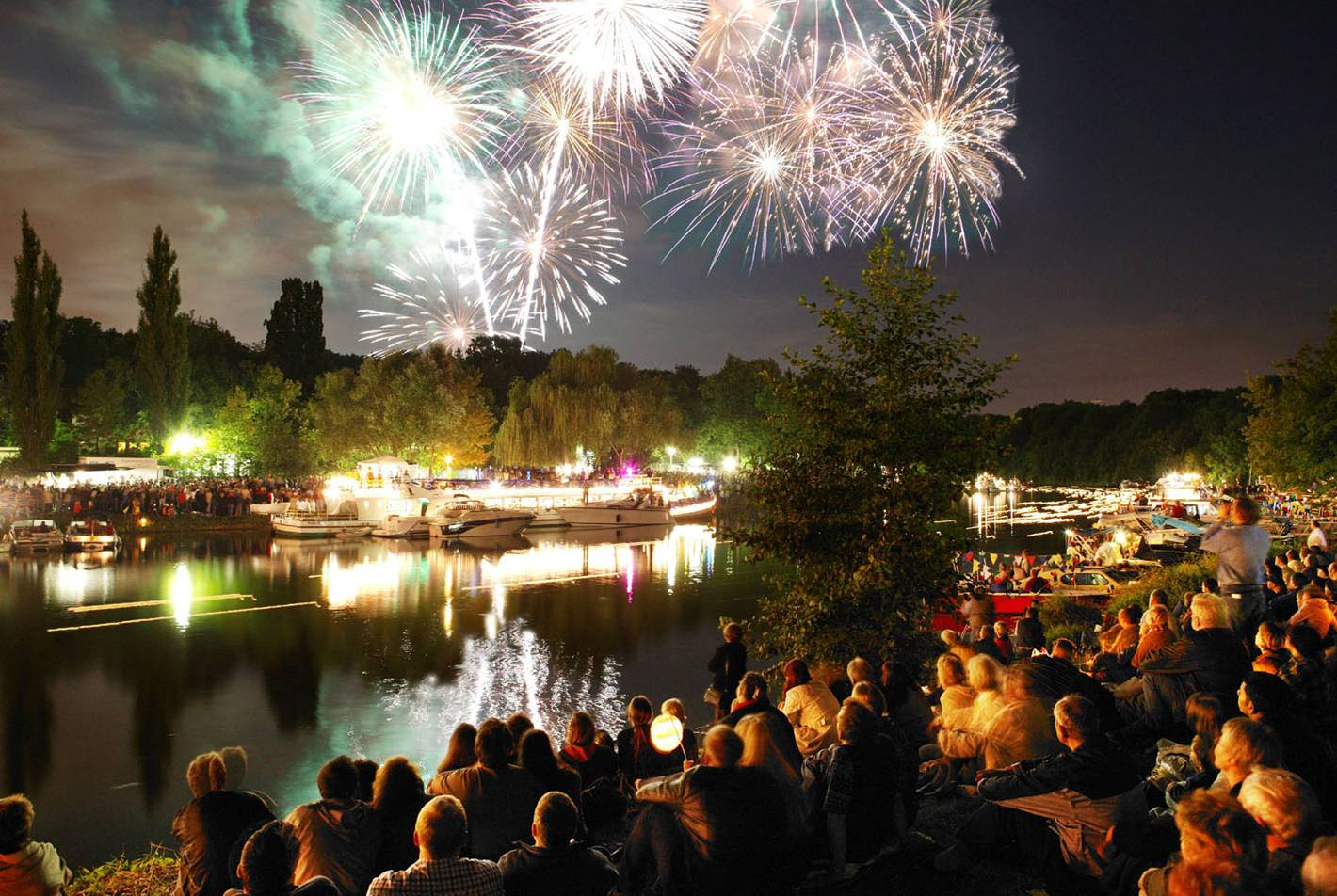 Den Höhepunkt des Laternenfests in Halle (Saale) ist das große Feuerwerk über der Saale.